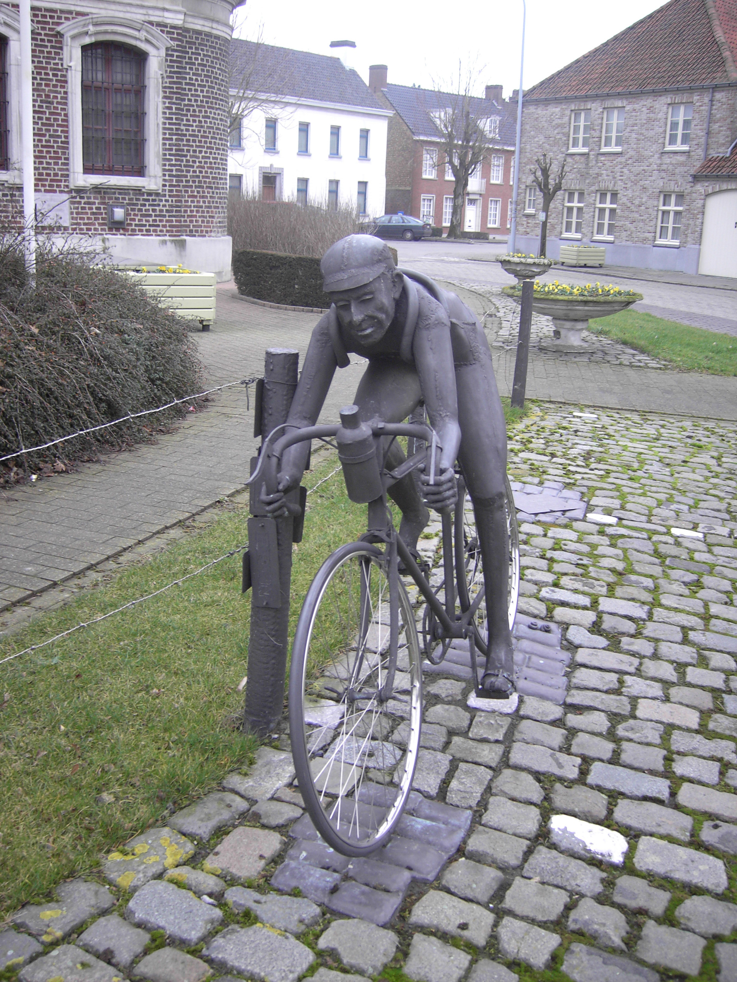 Kanegem (Tielt) - Briek Schotte (1919-2004), geboren in Kanegem.